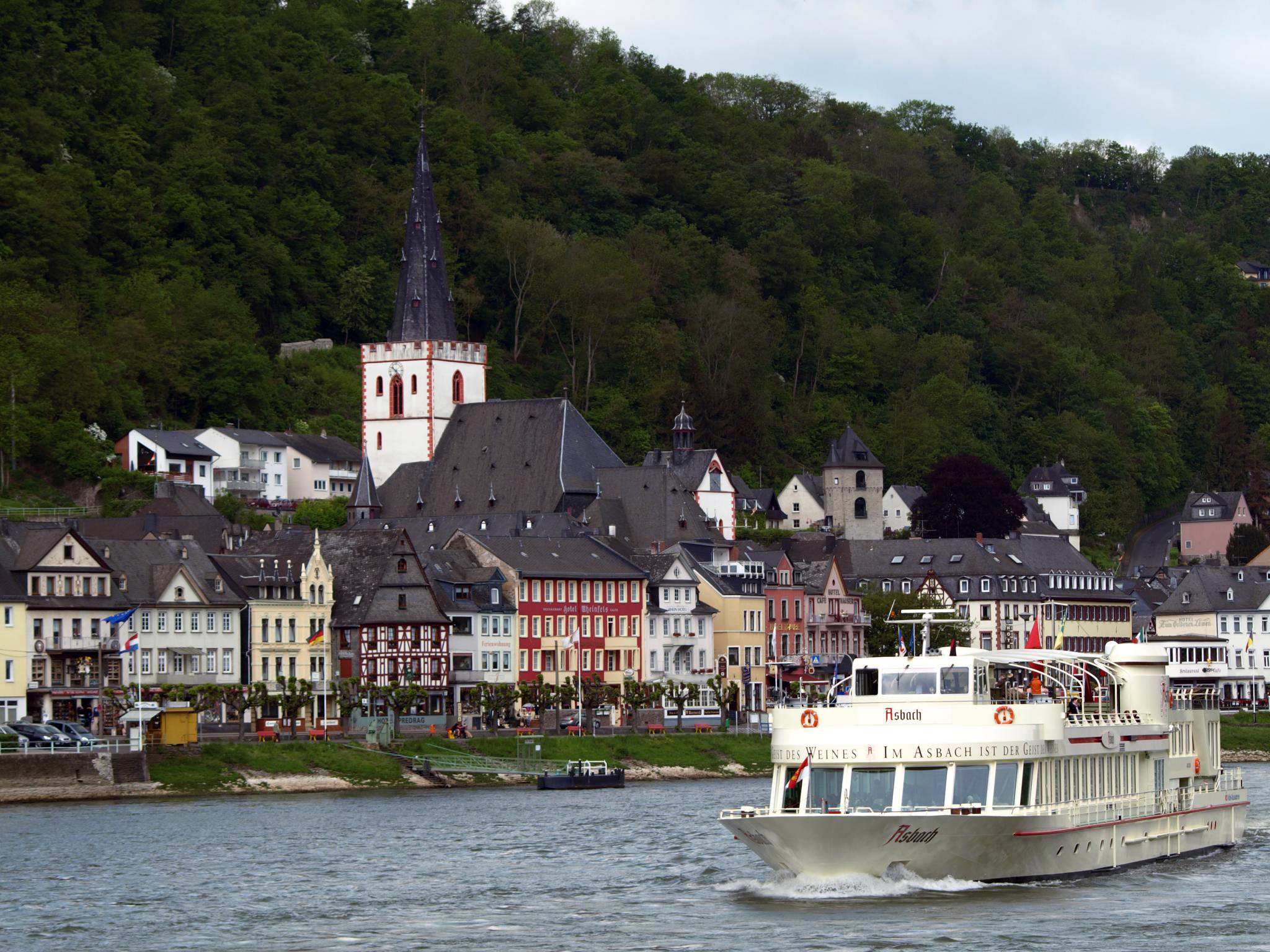 MS Asbach der Köln-Düsseldorfer vor Sankt Goar auf Fahrt Rhine River Cruise, Germany Camera: Olympus E-510 License on Flickr (2011-02-12): CC-BY-SA-2.0 Flickr tags: 2009, Justin Vickers, Olympus, E-510, Explore, nzboyinoz, Rhine River, Germany